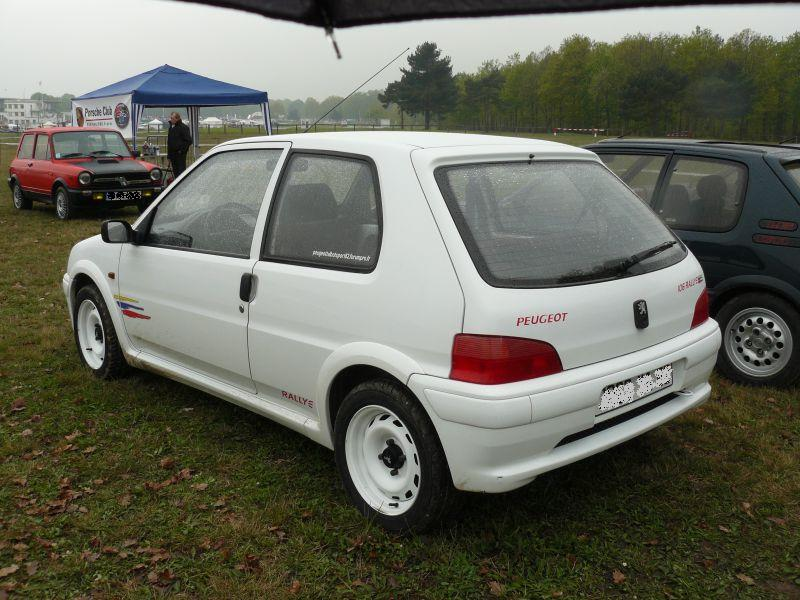 Photo prise à Montlhery en avril 2012